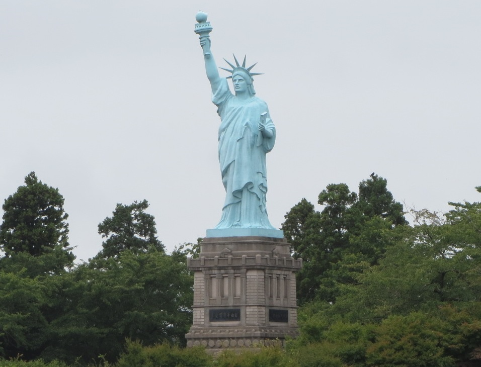 おいらせ町いちょう公園にある自由の女神像